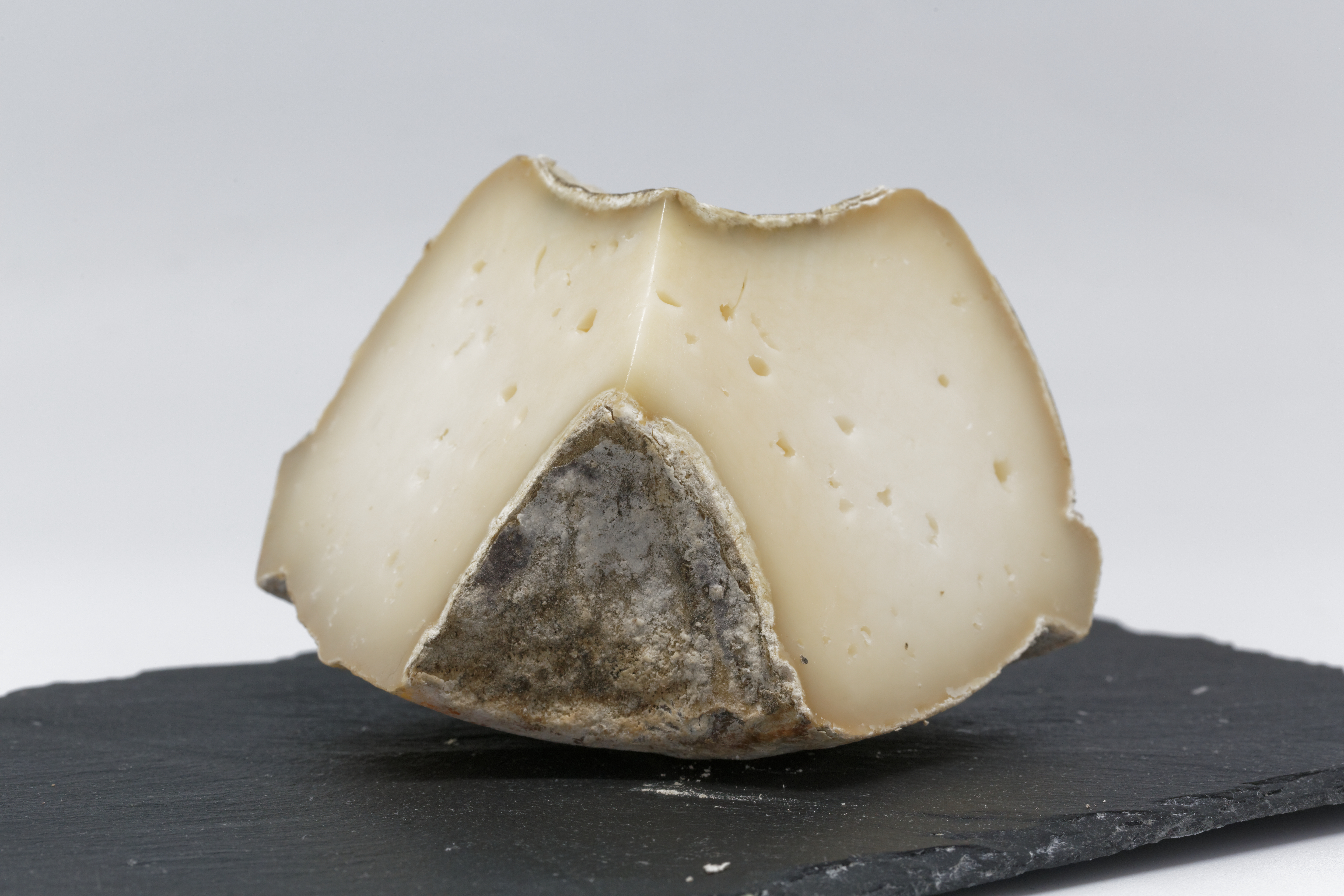 Le Troncho de Mayo, fromage espagnol de brebis au lait cru.